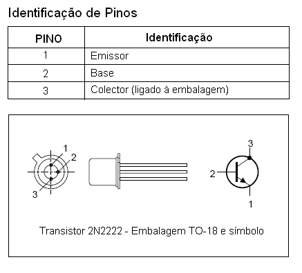 Transistor 2N2222 (símbolo, identificacion de pines)